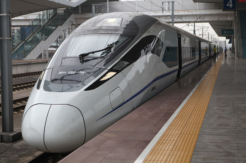 和谐号CRH380D型电力动车组停靠于广州北站